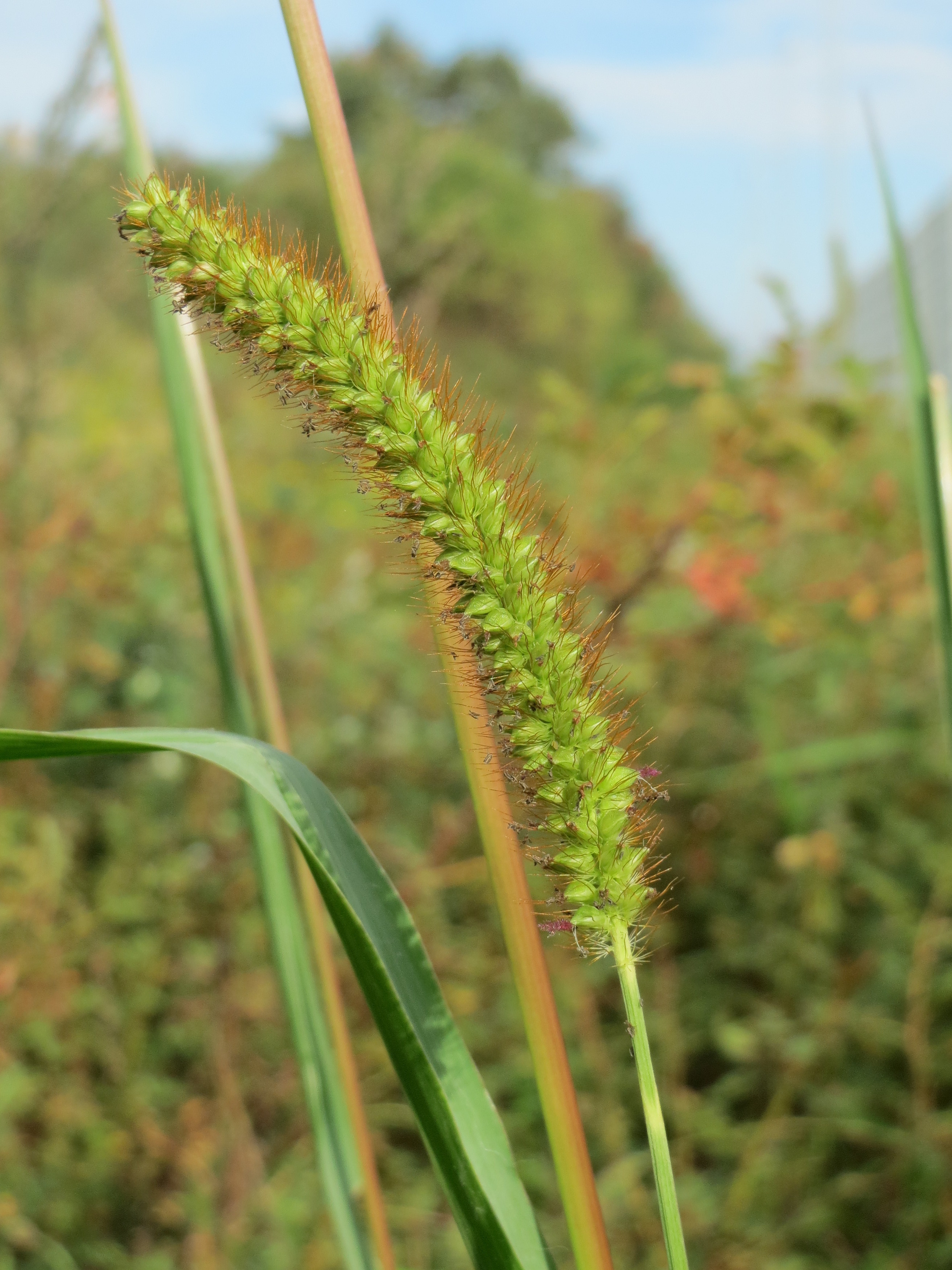 Rote Borstenhirse (Setaria pumila) an der A61 in Hockenheim-Talhaus